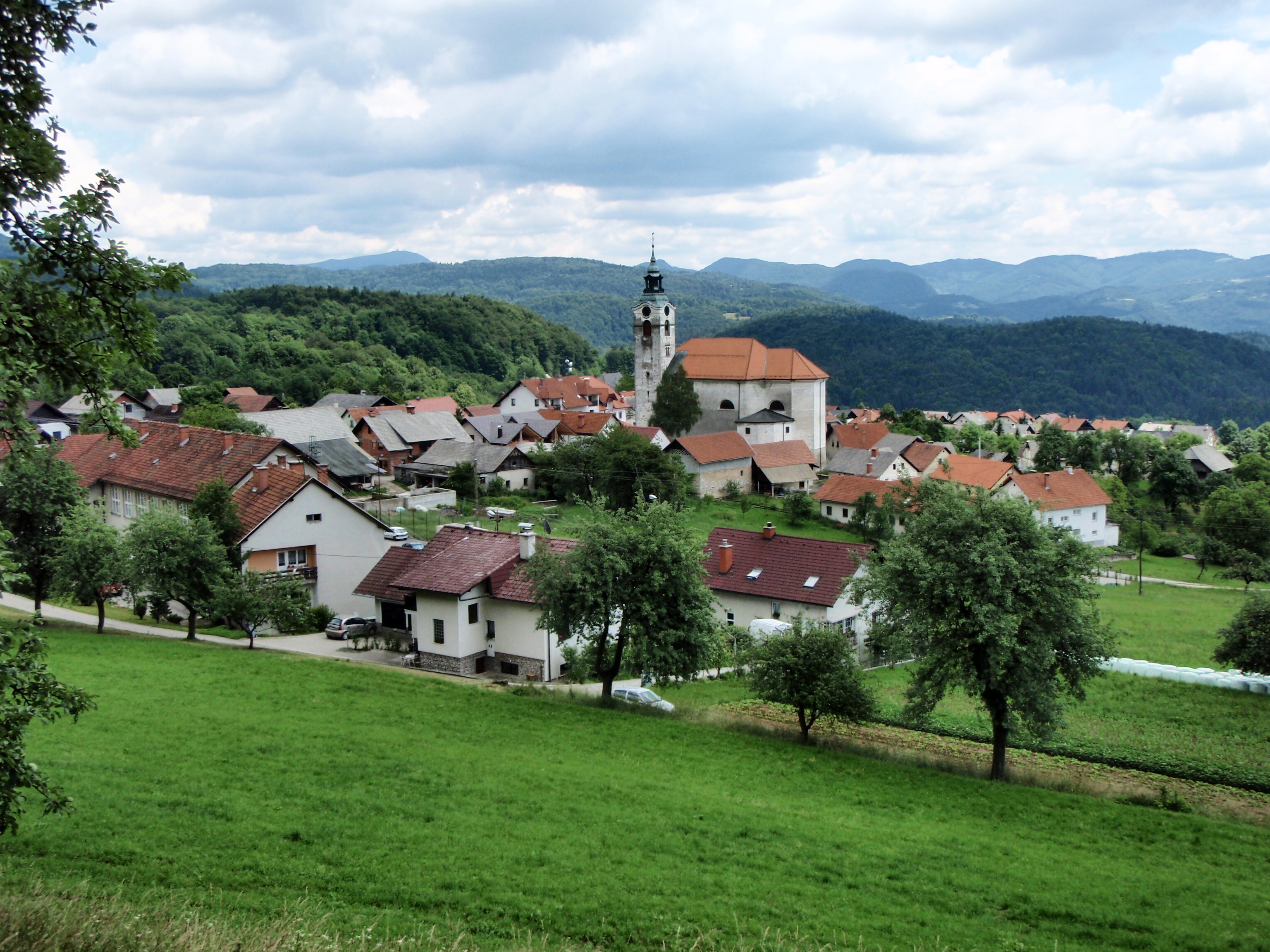 Pogled na selo Vače sa GEOSSA